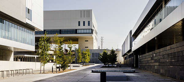 Imagen del conjunto de edificios del Campus Científico-Tecnológico de Linares